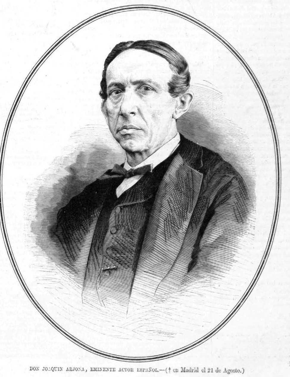 Joaquín Arjona. Grabado de Marcelo Paris. La Ilustración Española y Americana, 8 de septiembre de 1875, n.º XXXIII, p. 137.